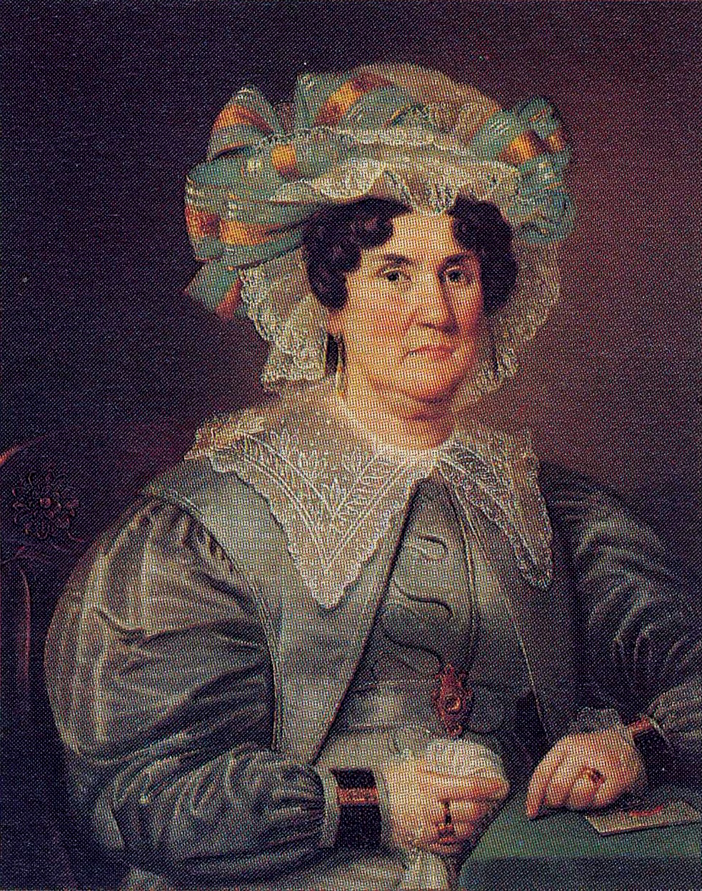 Suomen arkkispiispa Jakob Tengströmin vaimo, Anna Kristiina Tengström o.s. Caloander (1764–1831).